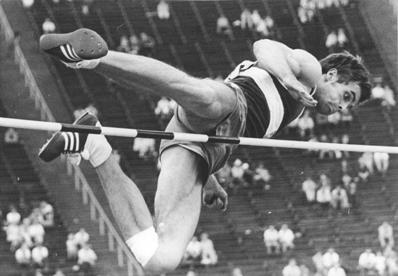 Stefan Junge ADN-ZB Gahlbeck 10.6.72 Potsdam: Leichtathletik-Länderkampf DDR - Bulgarien (1. Tag) . Einen ausgezeichneten neuen DDR-Rekord erzielte Stefan Junge (SC DHfK Leipzig - Foto von einem früheren Wettkampf) mit 2,23 m im Hochsprung der Männer. Er sprang 2,17, 2,20 und 2,23 jeweils im ersten Versuch. Die alte Rekordmarke wurde mit 2,18 m von Rudi Köppen gehalten (1969) .